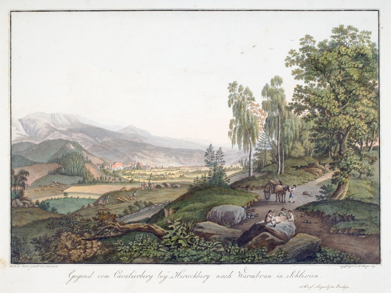 Daniel Berger nach Sebastian Carl Christoph Reinhardt: „Blick vom Kavalierberg bei Hirschberg nach Warmbrunn“, 1793, Kolorierte Radierung mit Kupferstich. Kunstforum Ostdeutsche Galerie Regensburg, Sammlung Haselbach, Inv. Nr. P 5166)